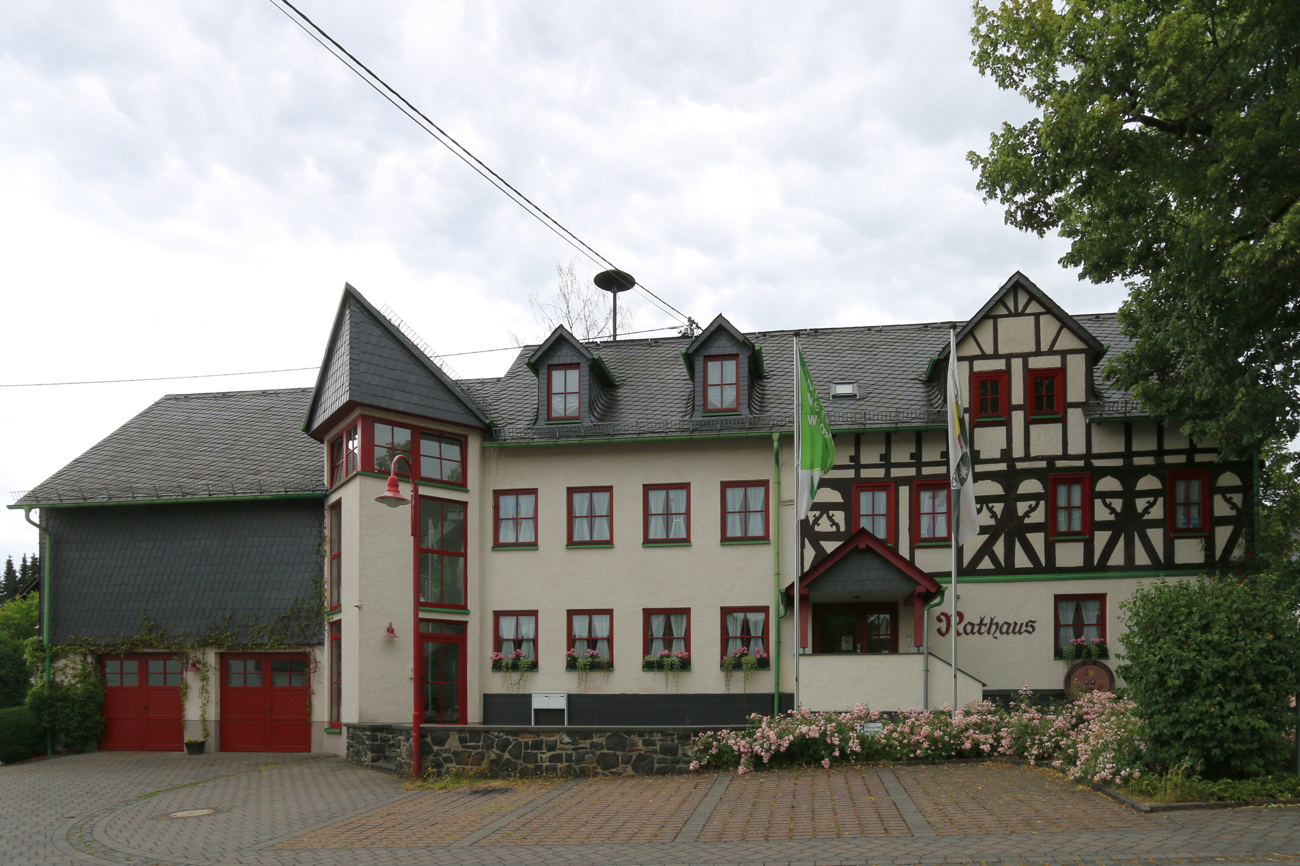 Irmtraut, Westerwald: Rathaus